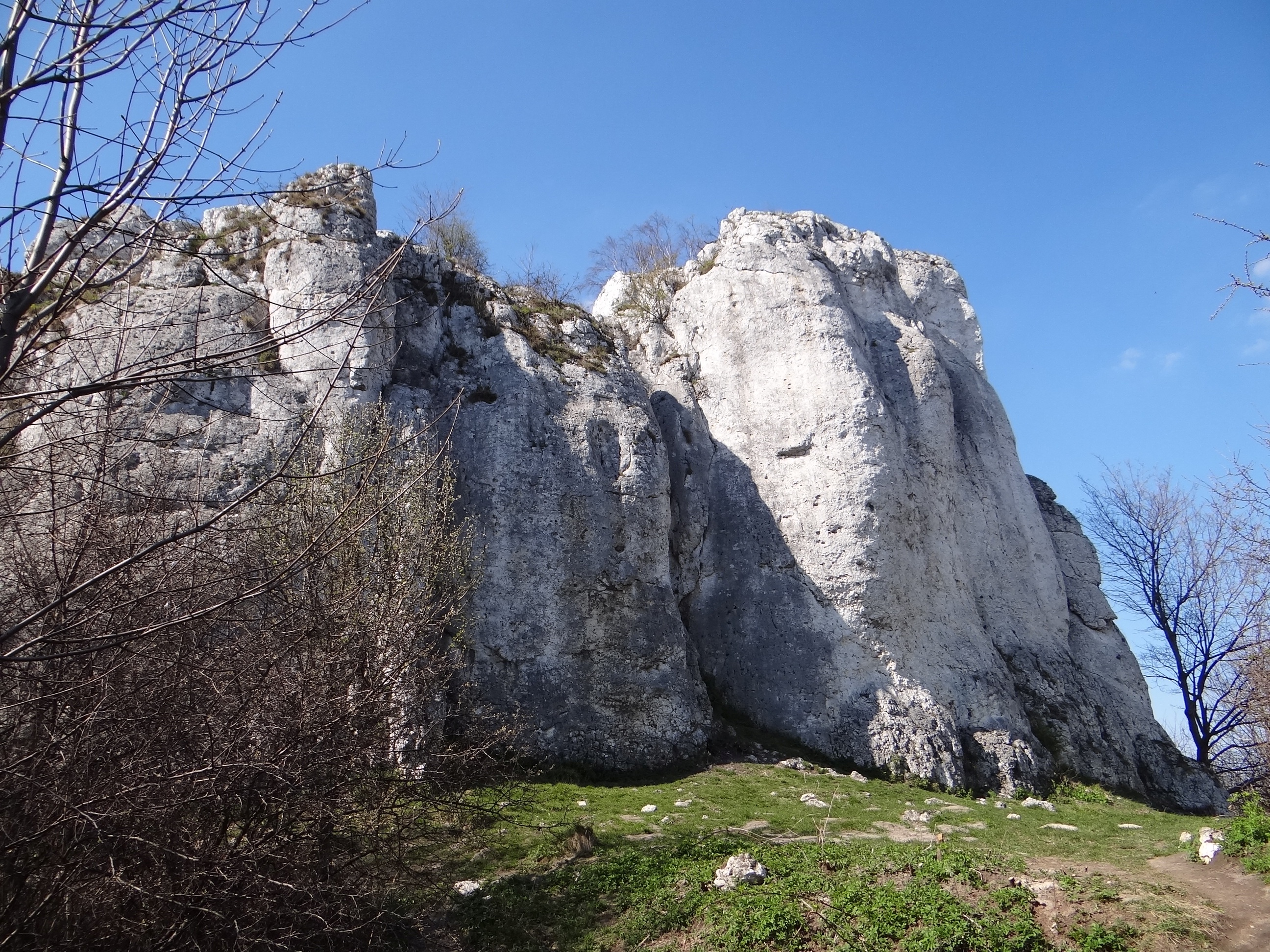 Filarek Bularza w Słonecznych skałach na Wyżynie Olkuskiej